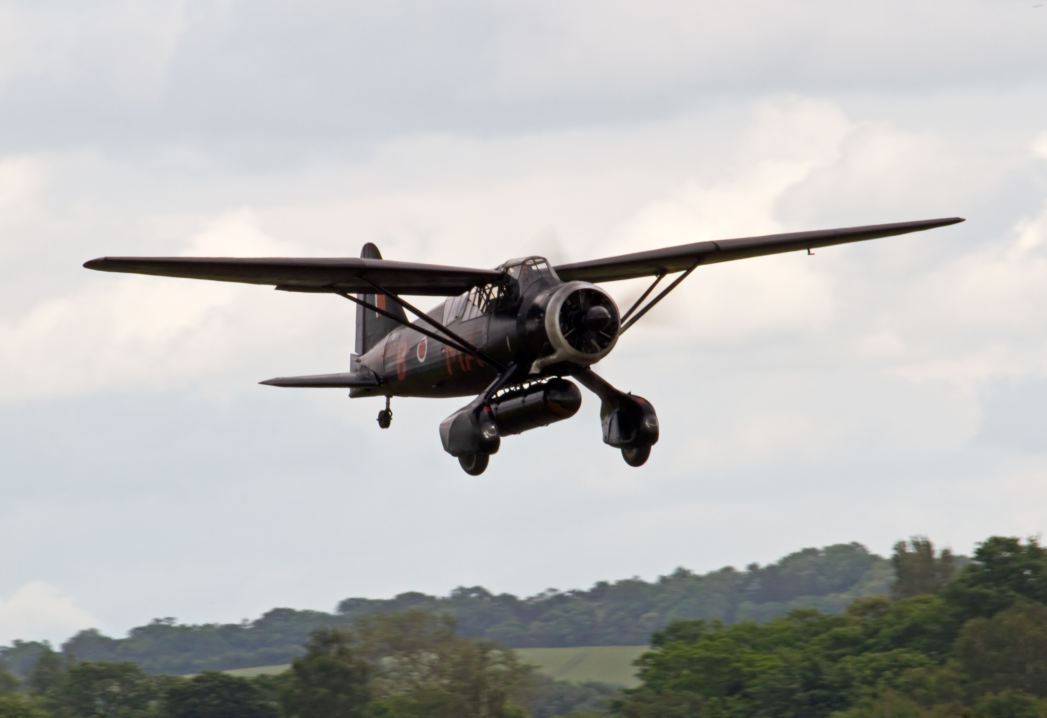 Lyander IIIA 3